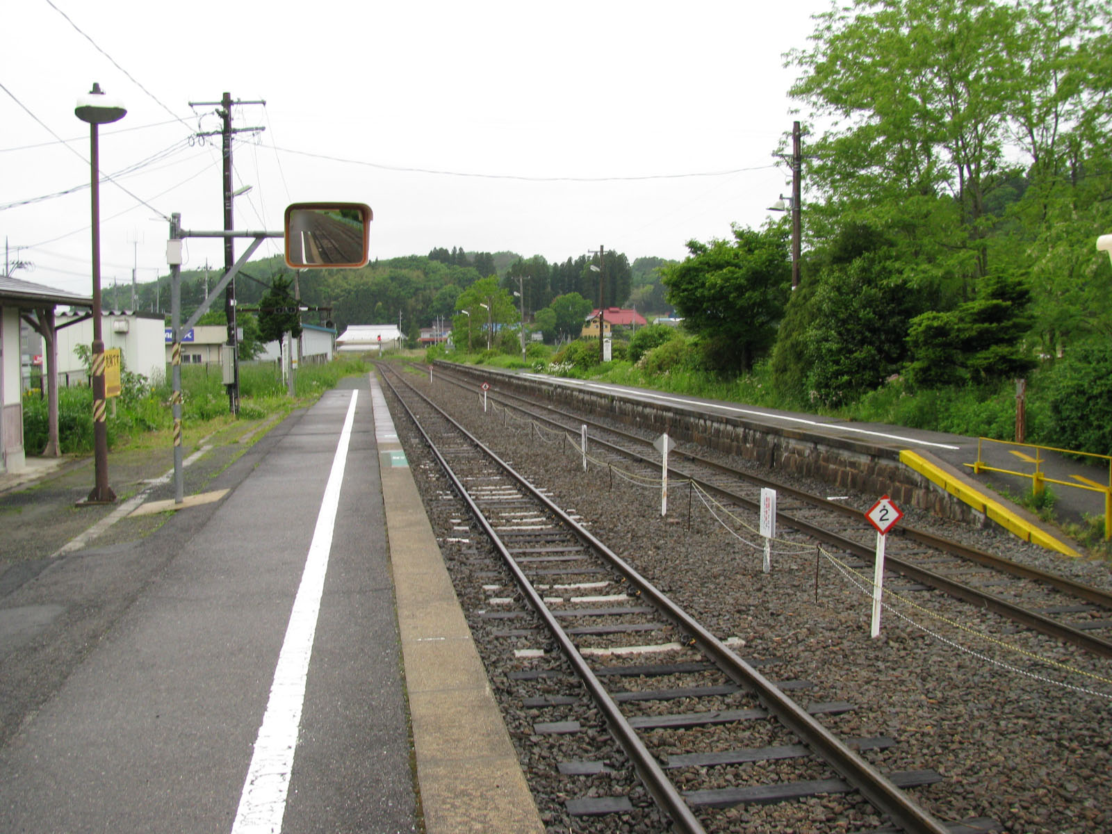 磐越東線磐城常葉駅